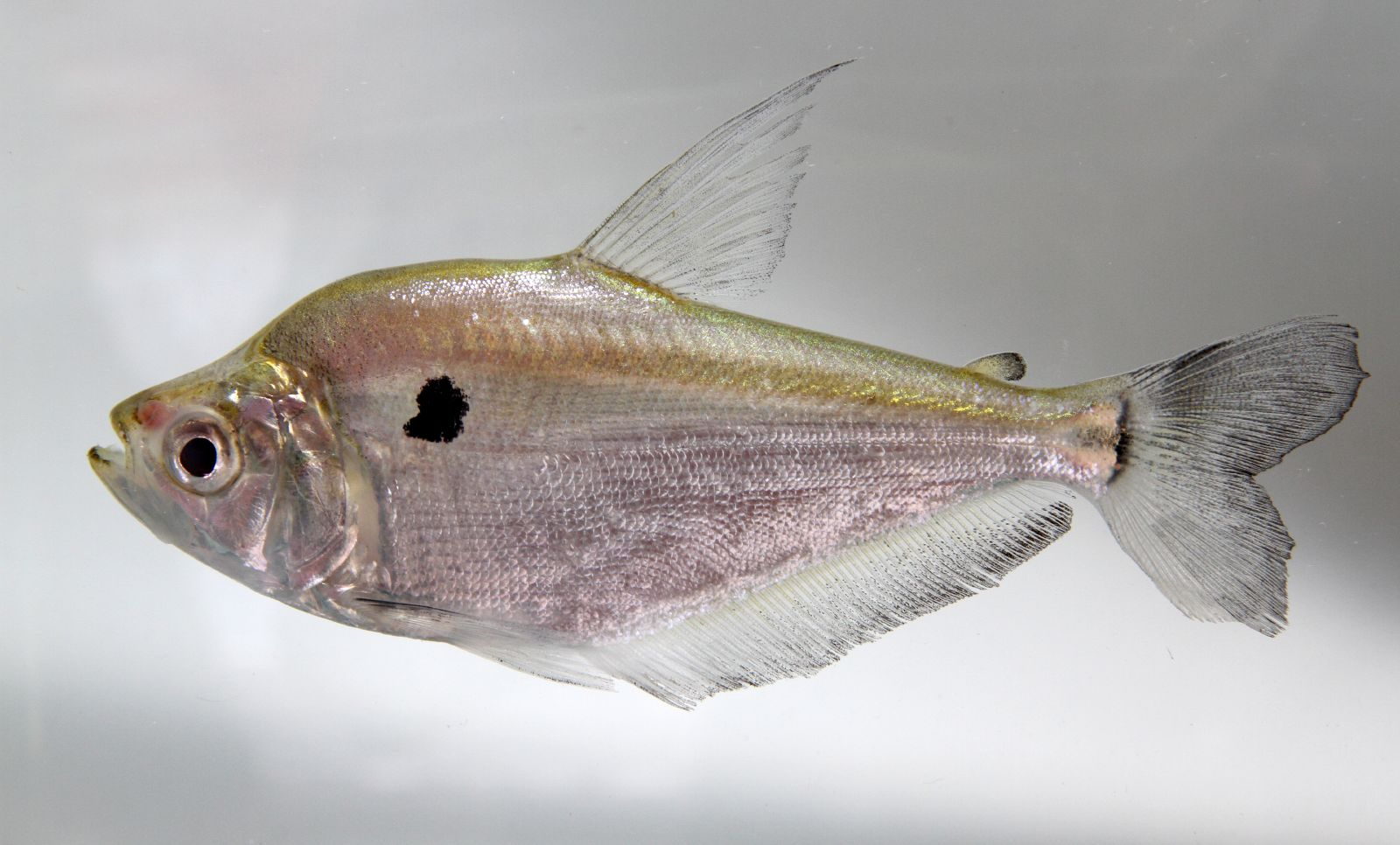 Roeboides sp.